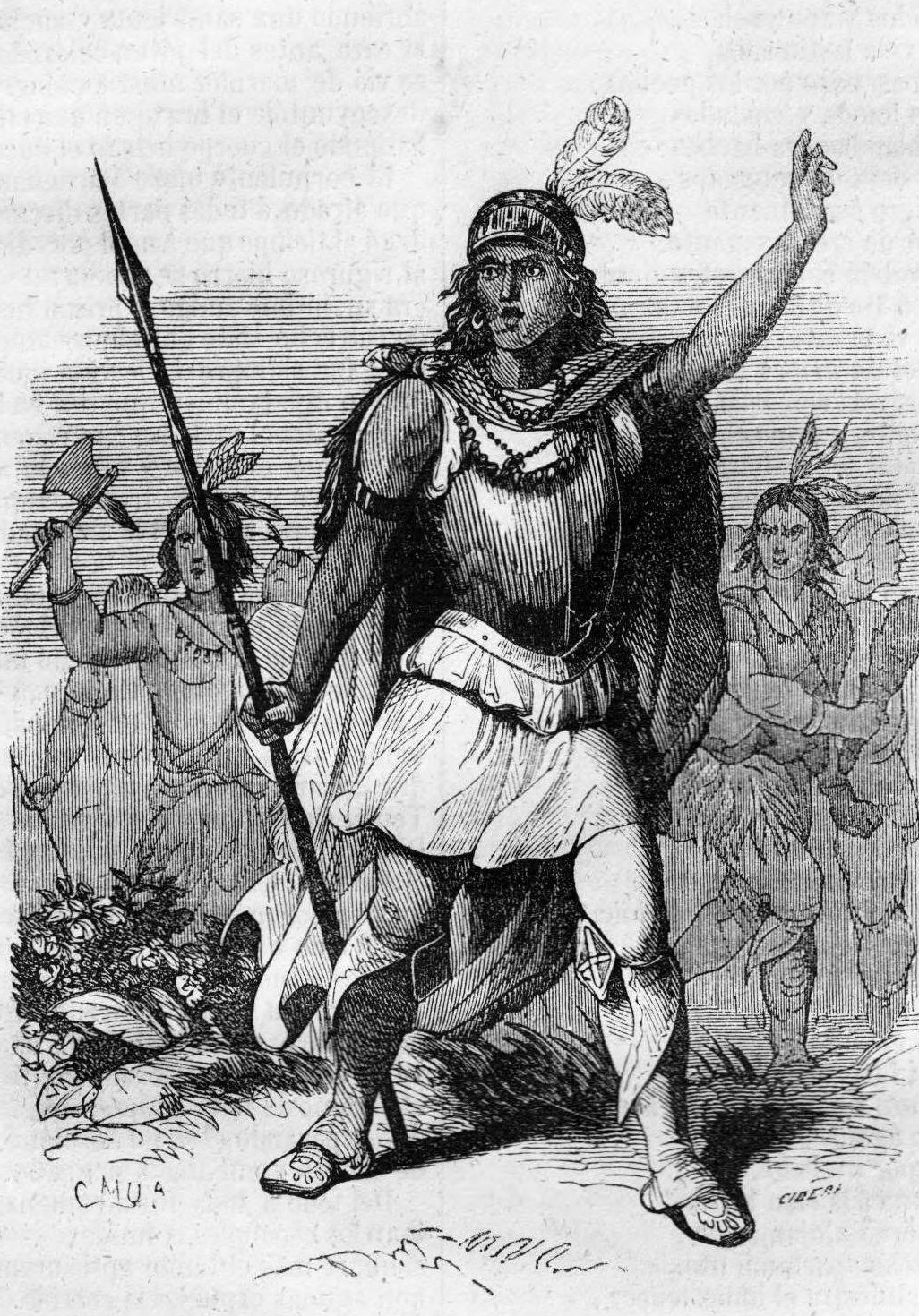 Lautaro al frente de su Ejército, hacia 1550. En La Araucana : poema / de D. Alonso de Ercilla y Zuñiga. Madrid : Impr. de Gaspar y Roig, 1852. 168 p.